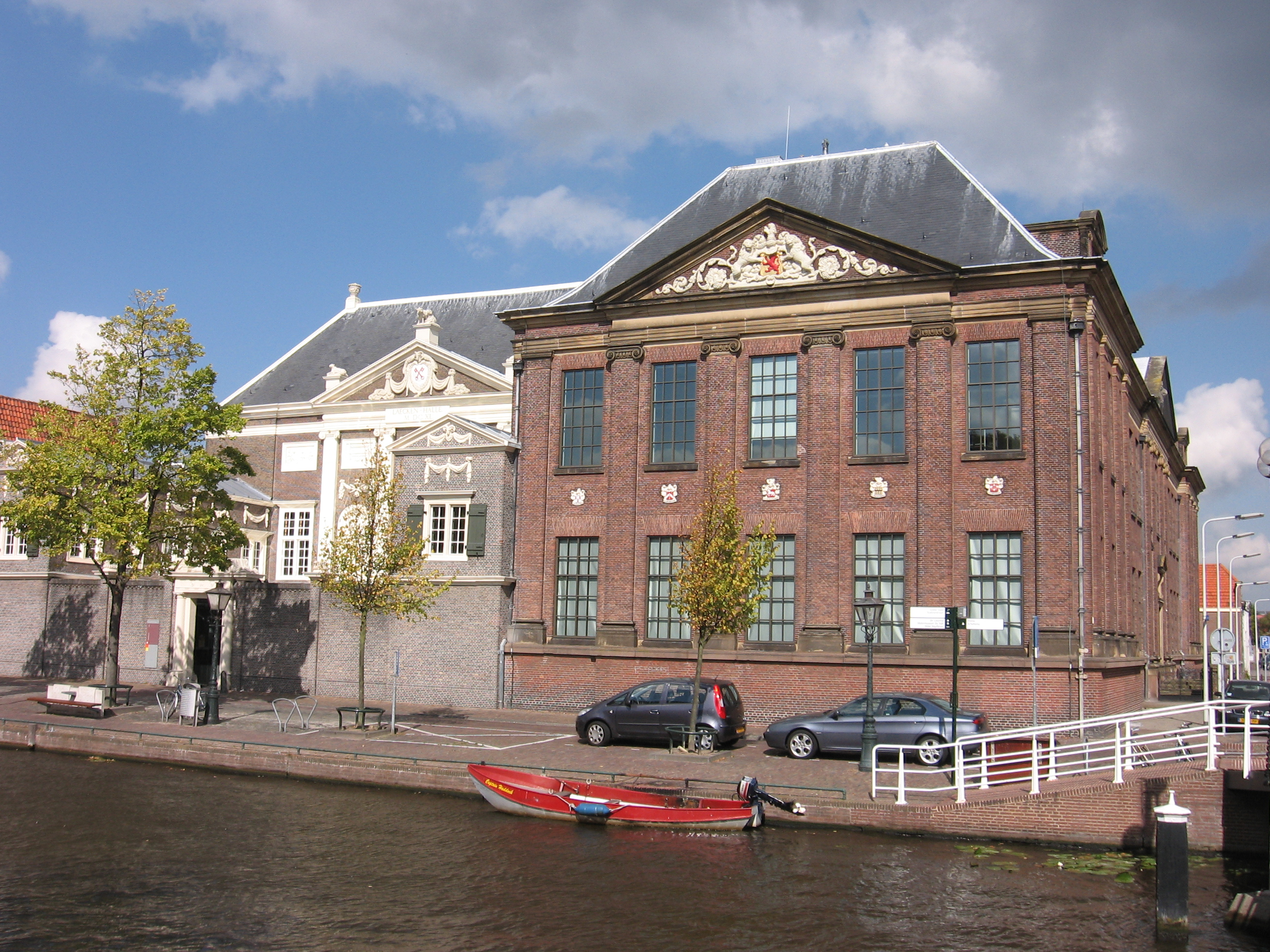 De Lakenhal / Gebouw Scheltema, de oude Wollendekenfabriek, Leiden Museum De Lakenhal Native nameMuseum De LakenhalLocationLeidenCoordinates52° 09′ 47.02″ N, 4° 29′ 15″ E Established1874Web page control : Q2098586 VIAF: 128760252 ISNI: 0000 0001 2323 0050 ULAN: 500301313 LCCN: n50057359 GND: 808287-X WorldCat institution QS:P195,Q2098586